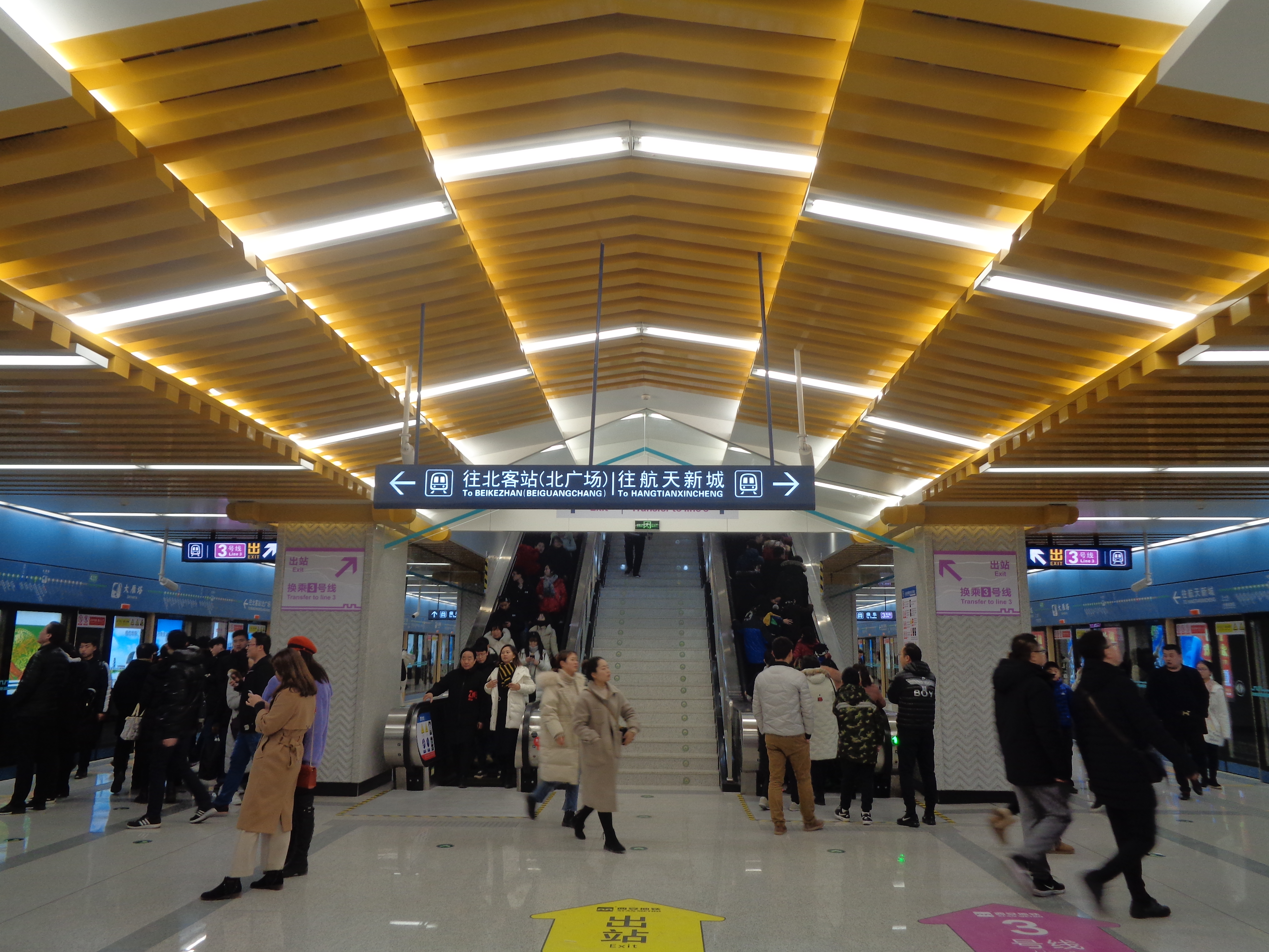 西安地铁大雁塔站四号线乘车层